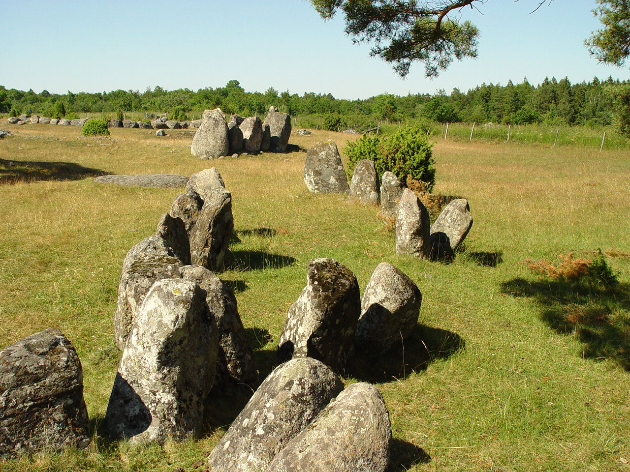 Gotland, Grabstätte Gålrum (über 100 Gräber, Ort:Gemeinde Alskog). Schiffssetzung